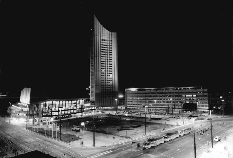 Leipzig, "Neues Gewandhaus", Universitätshochhaus, Nacht ADN-ZB Grubitzsch 8.10.81 Leipzig-Gewandhaus- Das Neue Gewandhaus vor der Eröffnung im Ensemble des Karl-Marx-Platzes der Messestadt. Im Hintergrund schießen sich die Gebäude der Karl-Marx-Universität an.